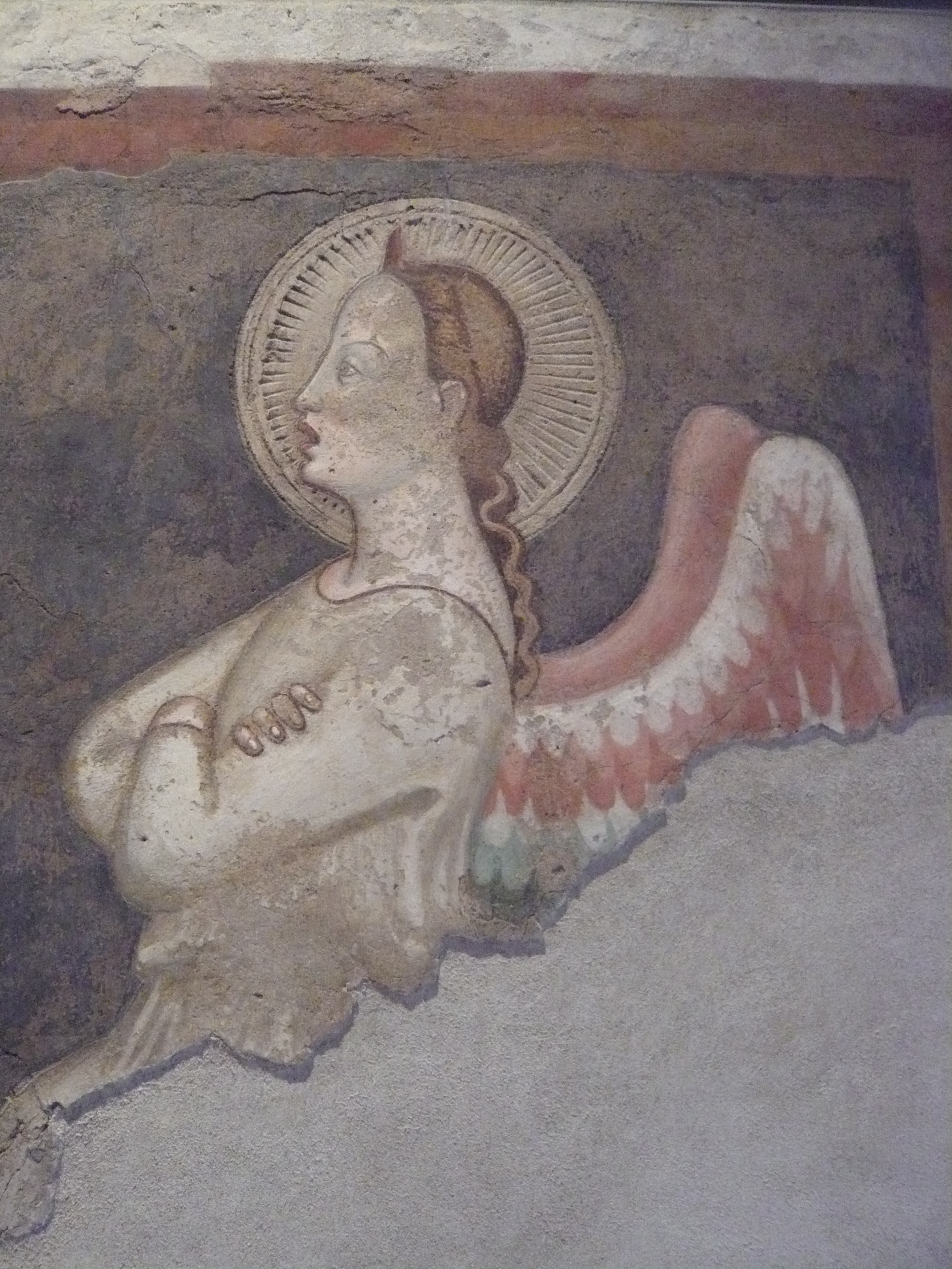 Gabriel, Angelo annunciante